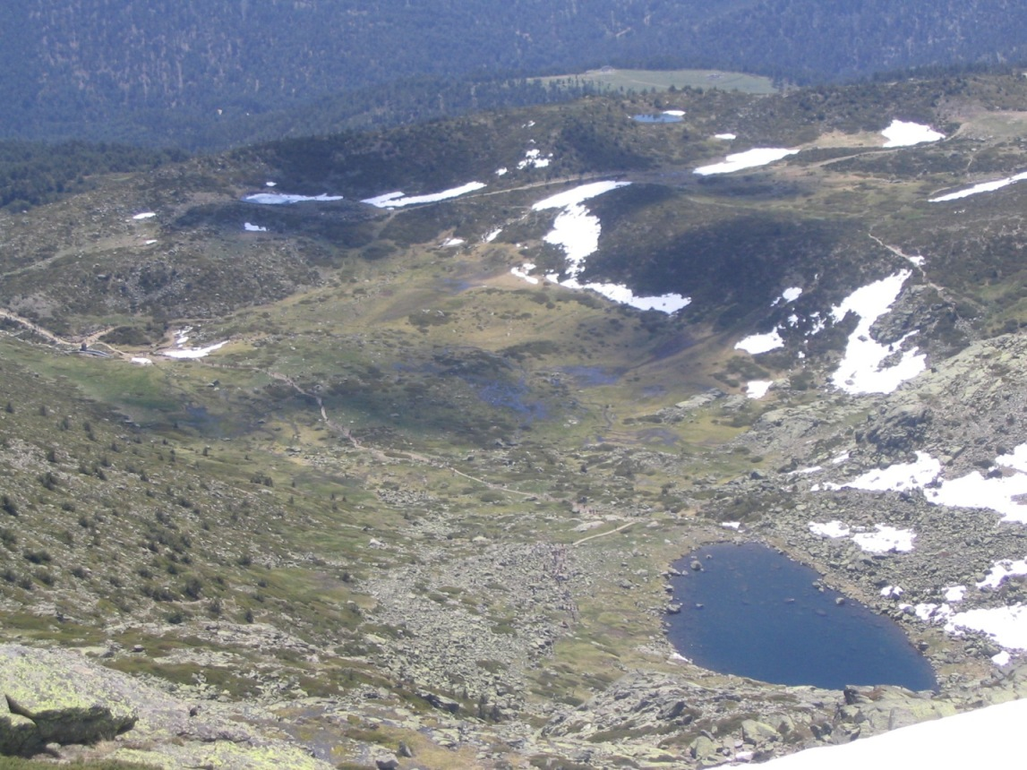 Lagunas de Peñalara vistas desde la cima de Peñalara.